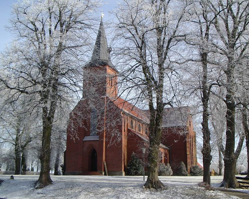 Photo taken by User:Geoz February 2006 Die Kirche St. Georg in Wester-Wanna